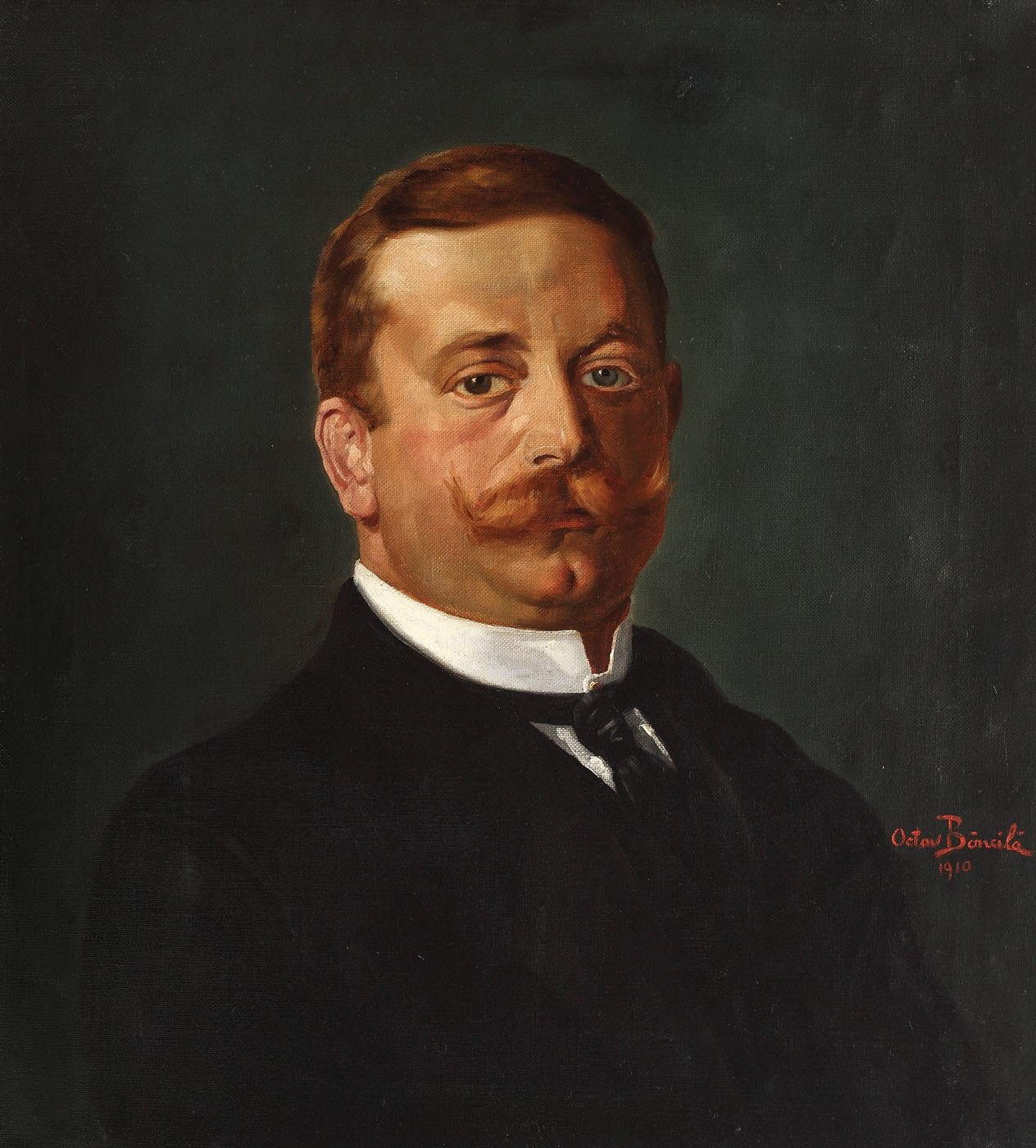 Ion Nădejde soțul Sofiei Băncilă, ulei pe pânză, 60 × 54 cm, semnat și datat lateral dreapta, cu roșu, "Octav Băncilă, 1910"